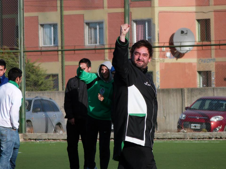 CARLOS PADIN DT ABC